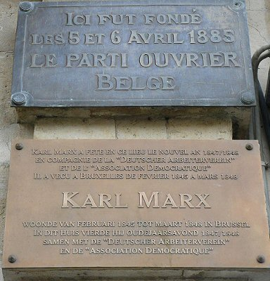 Plaque commémorative de la fondation du Parti Ouvrier Belge et du passage de Karl Marx à Bruxelles